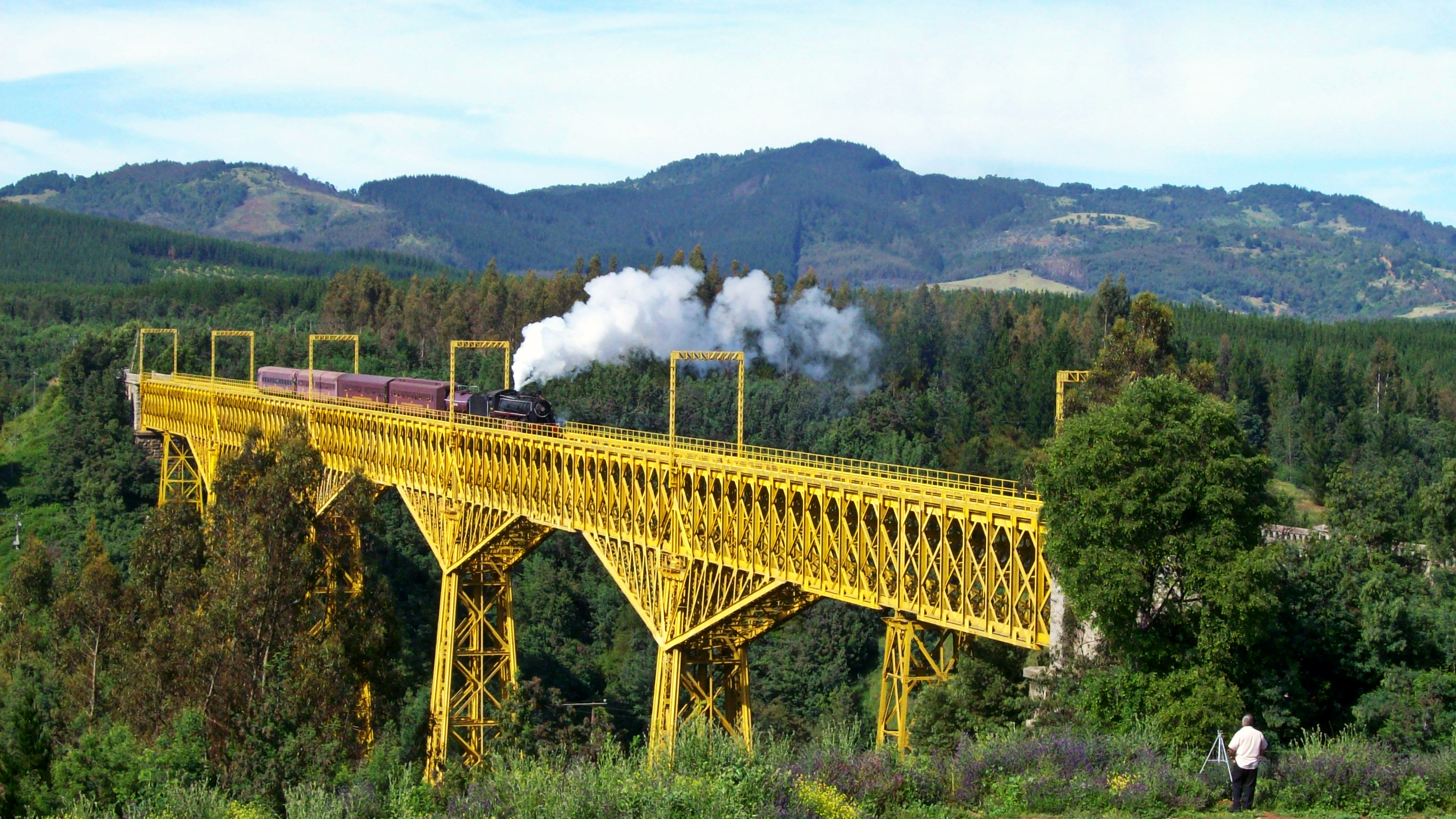 Tras enterarme de que habría una salida especial del "Tren de la Araucanía" con turistas extranjeros, hice todo lo posible para poder capturarlo en distintos lugares. La fecha se acercó. El día llegó. Partí casi improvisadamente a destino. Sin embargo, del plan original se cayó por temas de presupuesto. Solo, me quedó conformarme con ir a algunos lugares. O, mejor dicho, solamente a un solo lugar: Collipulli. A pesar de ello, el hecho de ver ahí a este magno tren ya fue suficiente y compensó enormemente mi paso por ese lugar... :) Y, bueno. Esas son mis aventuras "sobre rieles"... :) Saludos. Special "Araucania's Train" crossing over (by first time) Malleco's viaduct (Collipulli, Araucania's Region). All to the delight of railfans who was waiting this train with foreign tourists that were traveling to San Rosendo. Greetings! Patiperro por la vida...